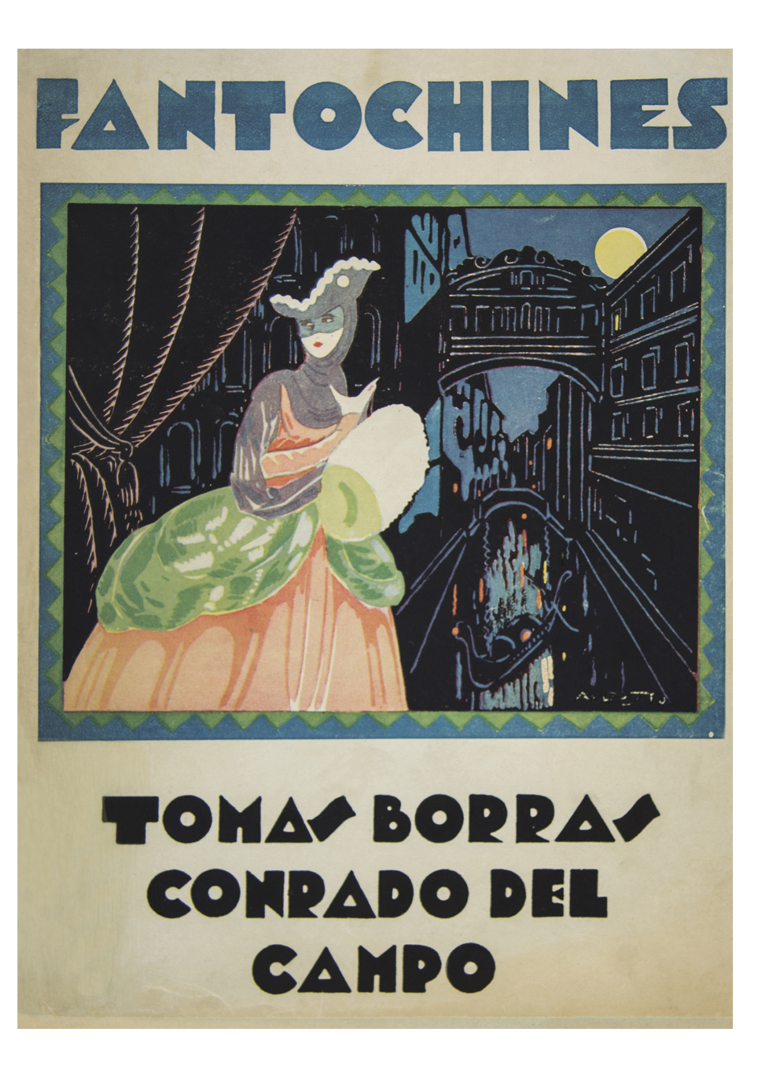 Cartell Fantochines llibret